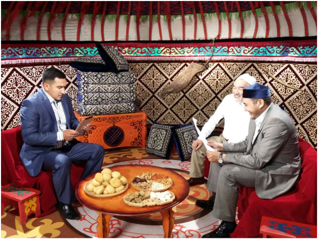 Байғабыл Ардақ Бекзатұлы